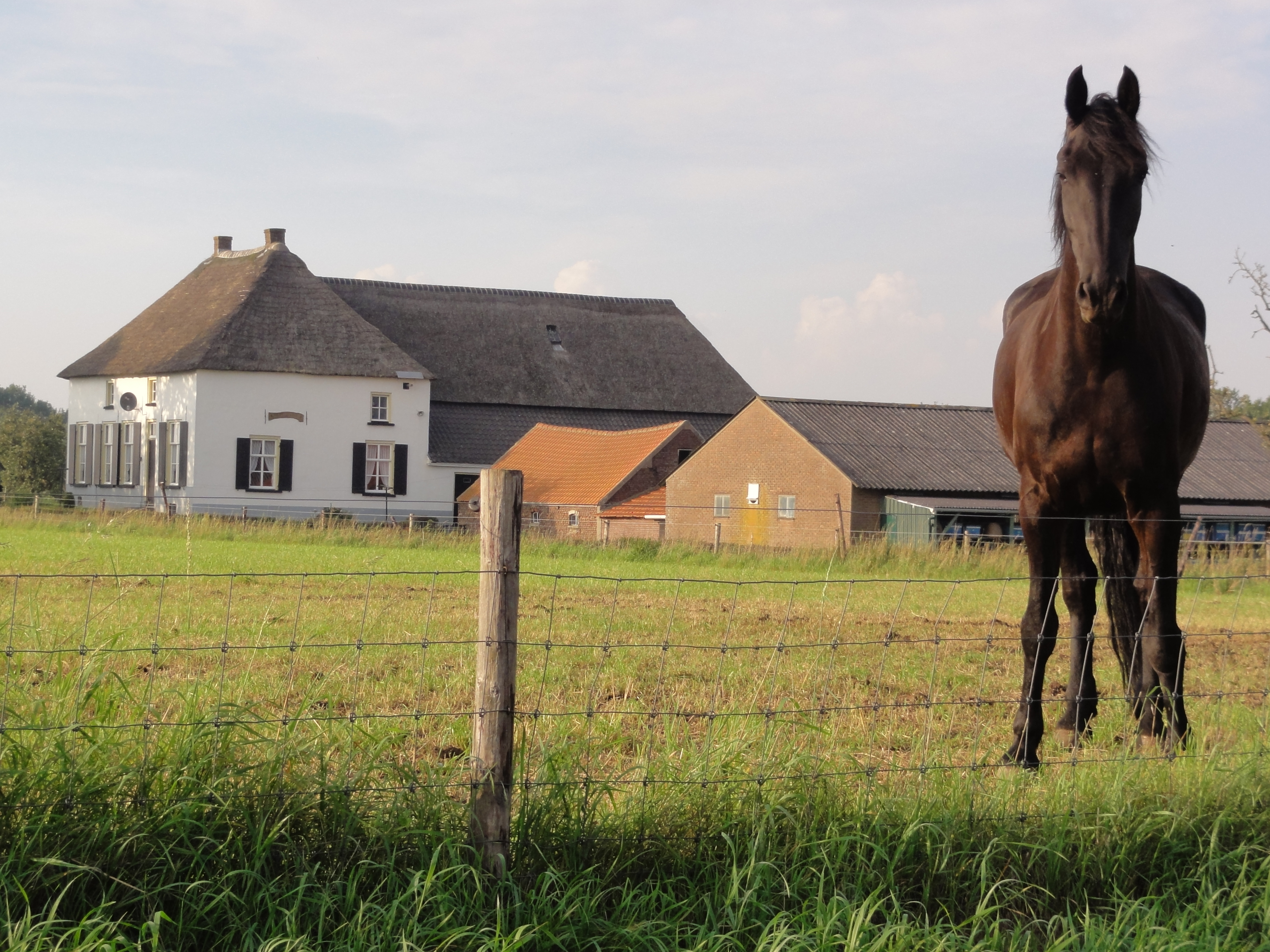 (Overasselt (Heumen) Rijksmonument 32116 IJkelaarstraat 1 met paard.